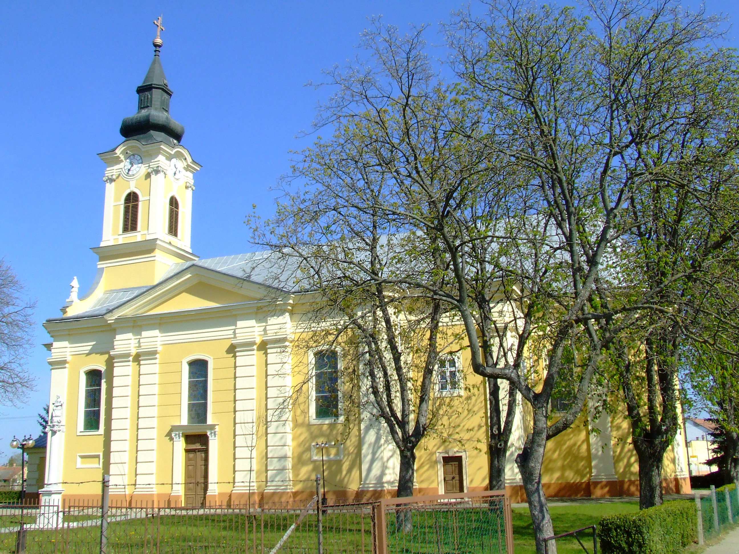 A hajósi Szent Imre-templom. Épült 1728 körül